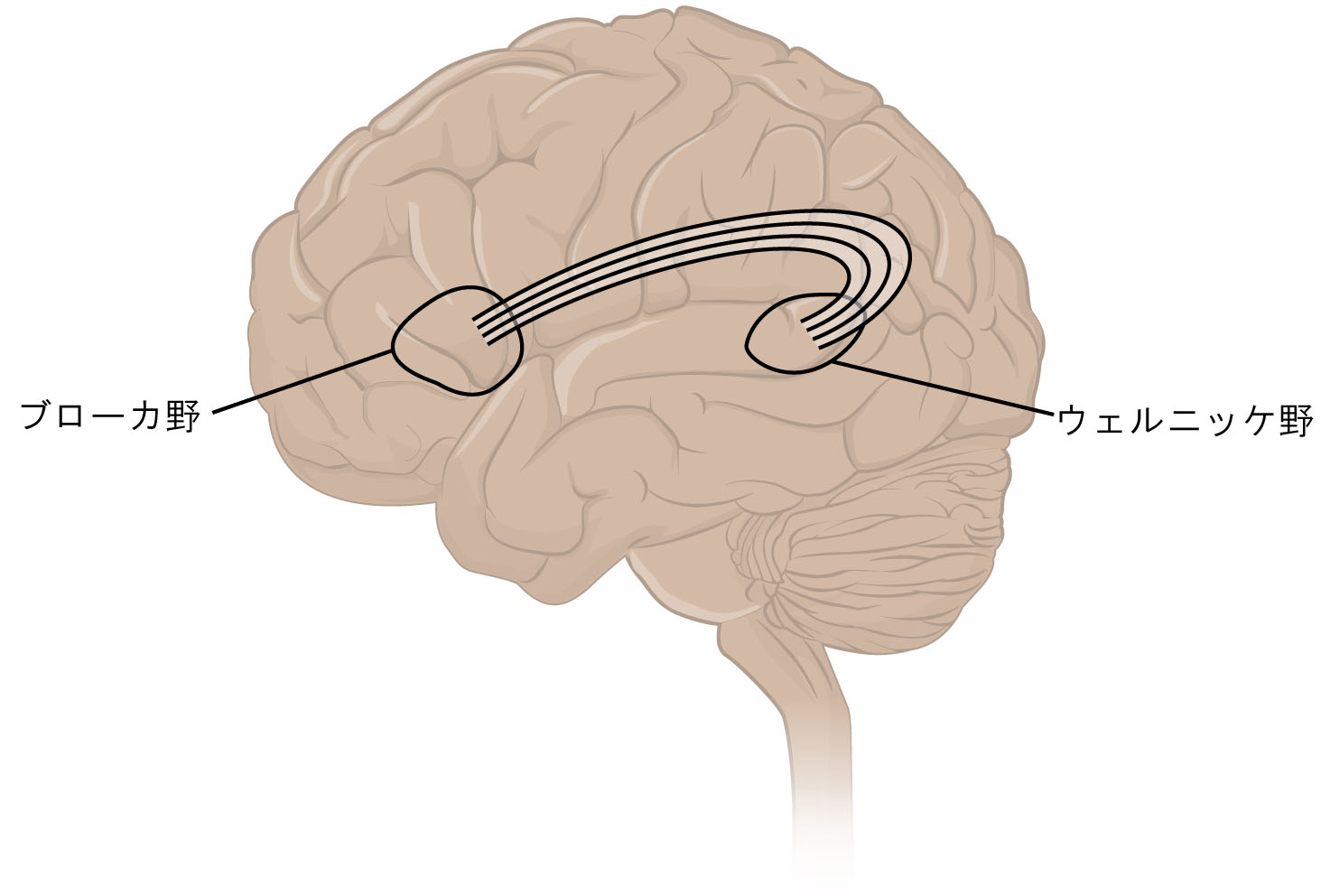 ヒトの脳のブローカ野とウェルニッケ野